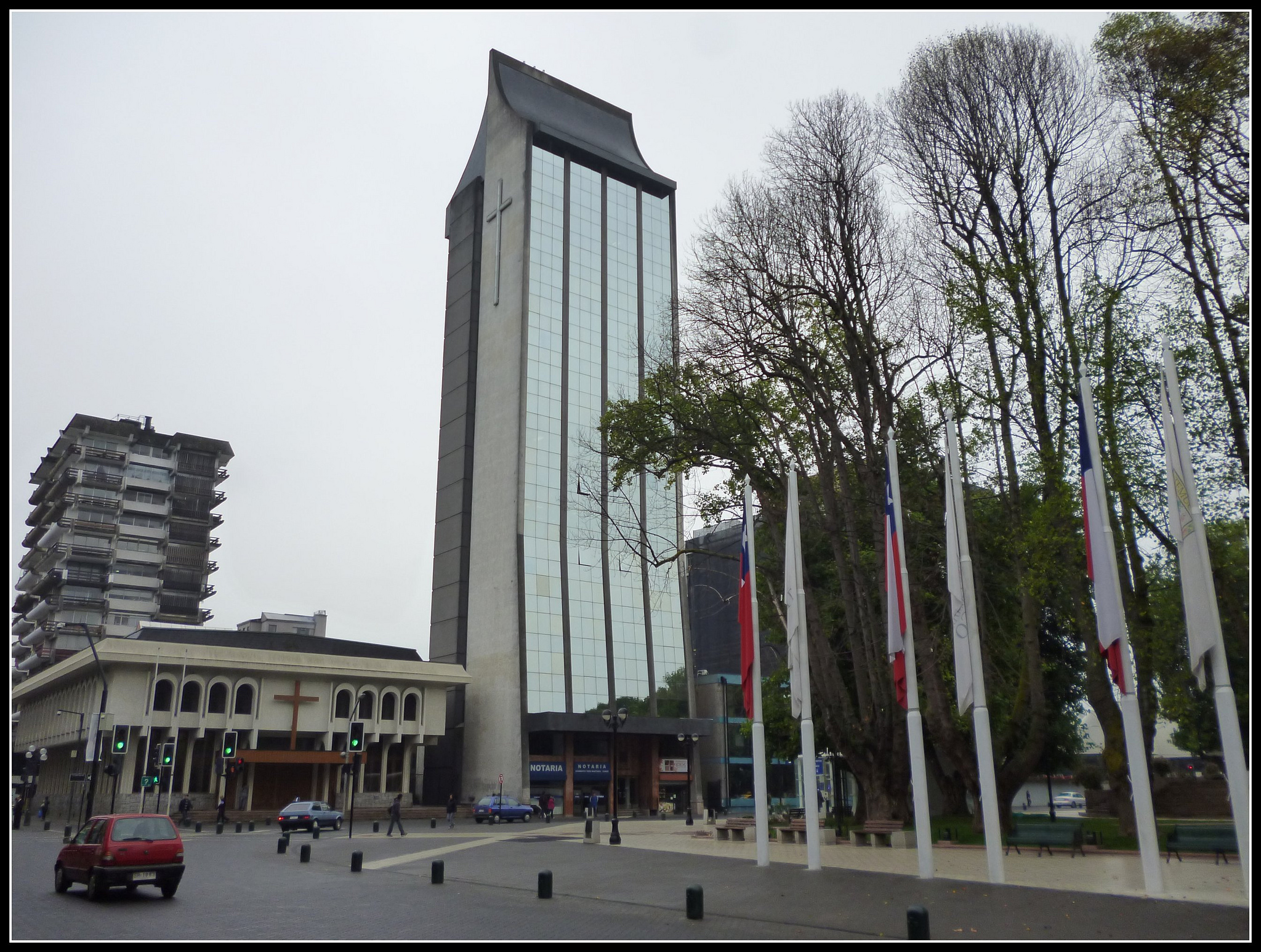 Catedral de San José, principal templo católico de la ciudad de Temuco, Chile, junto a la torre Campanario, ambos inmuebles ubicados frente a la Plaza de Armas de Temuco. Tras la catedral, se ve el edificio de la Secretaría Regional Ministerial de Bienes Nacionales de La Araucanía.